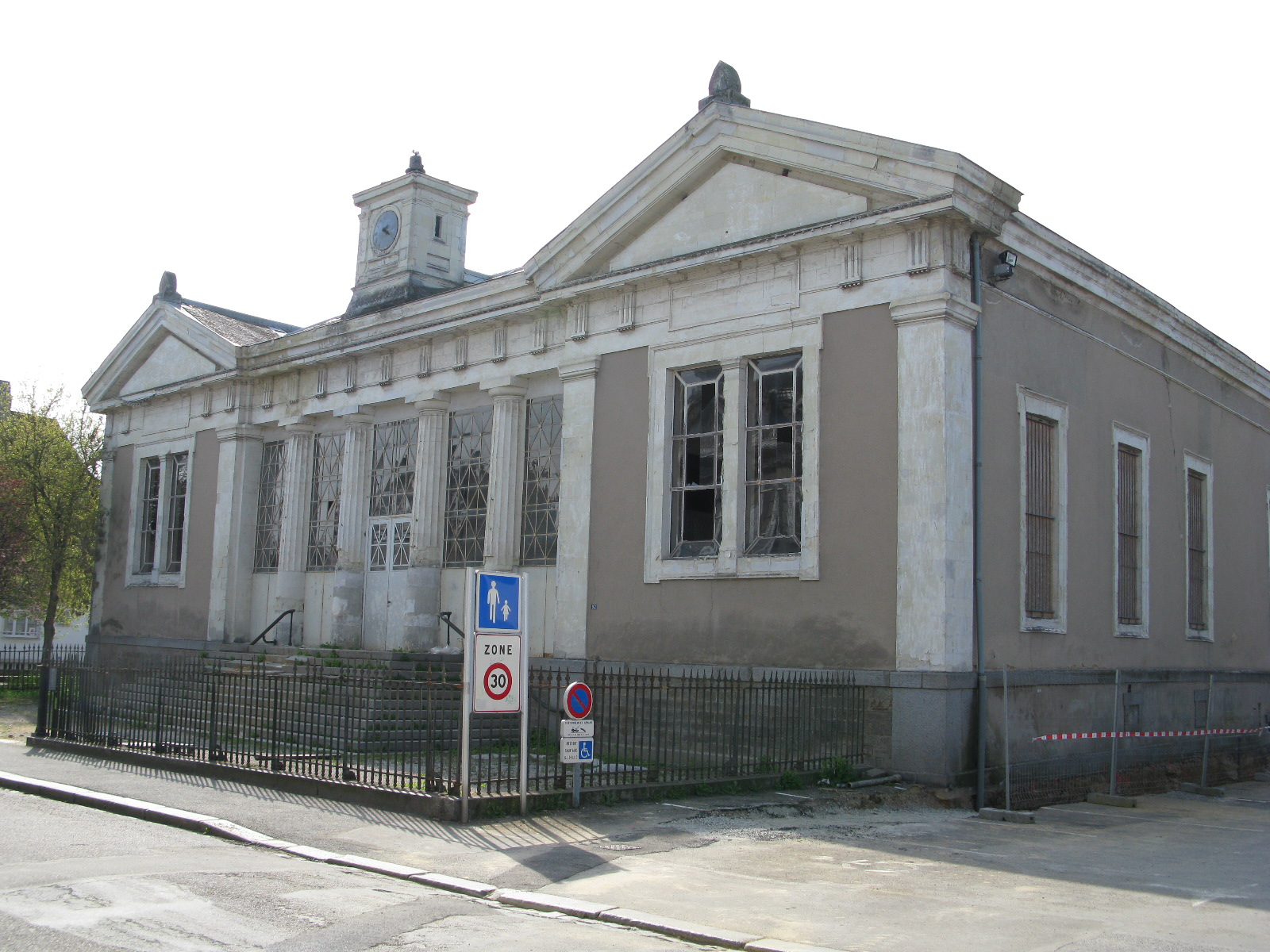 Le palais de justice de Mayenne